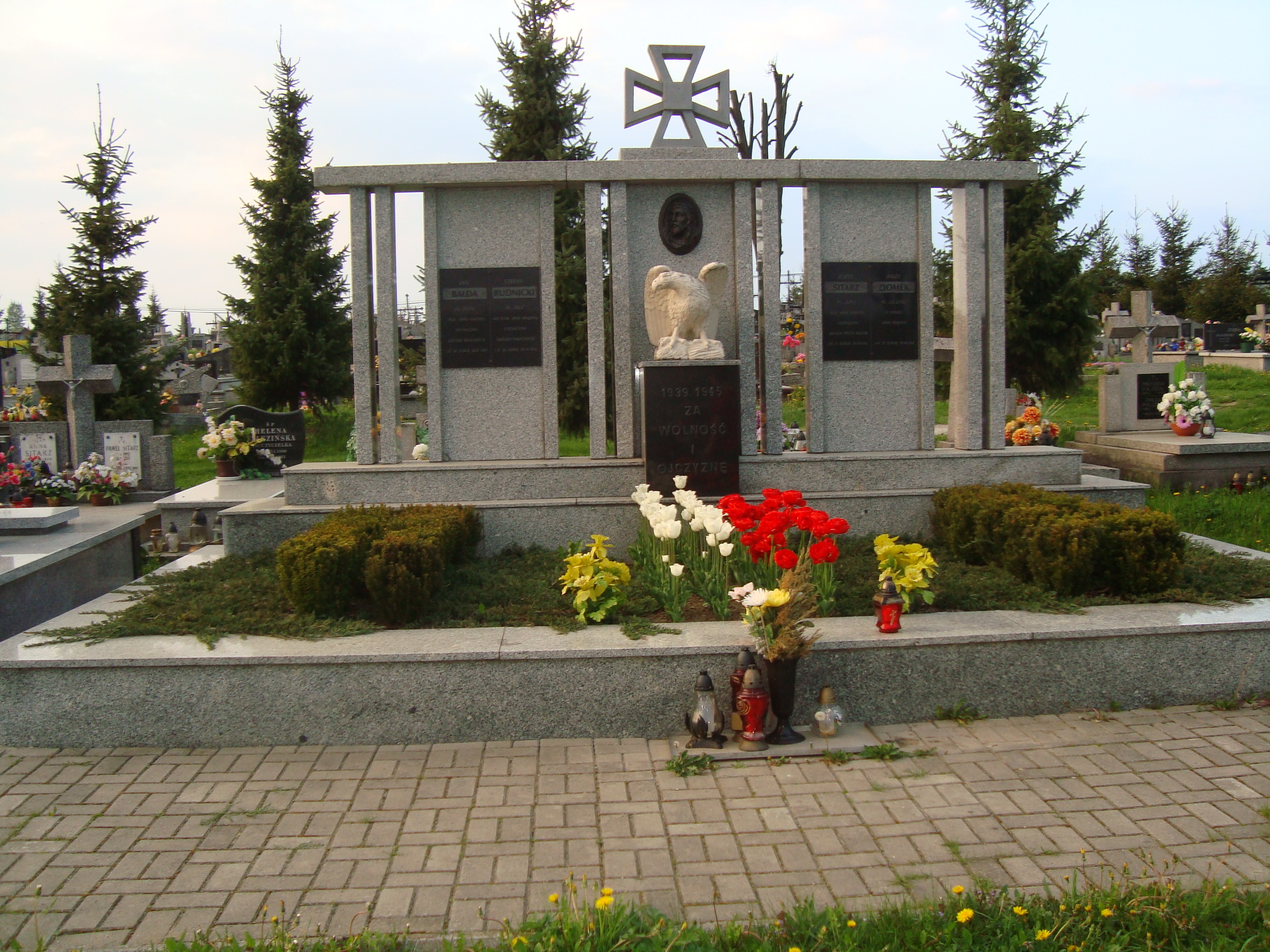 Pomnik poległych podczas II wojny światowej żołnierzy ugrupowania dywersyjno-propagandowego "Wedeta" na cmentarzu w Chmielniku.